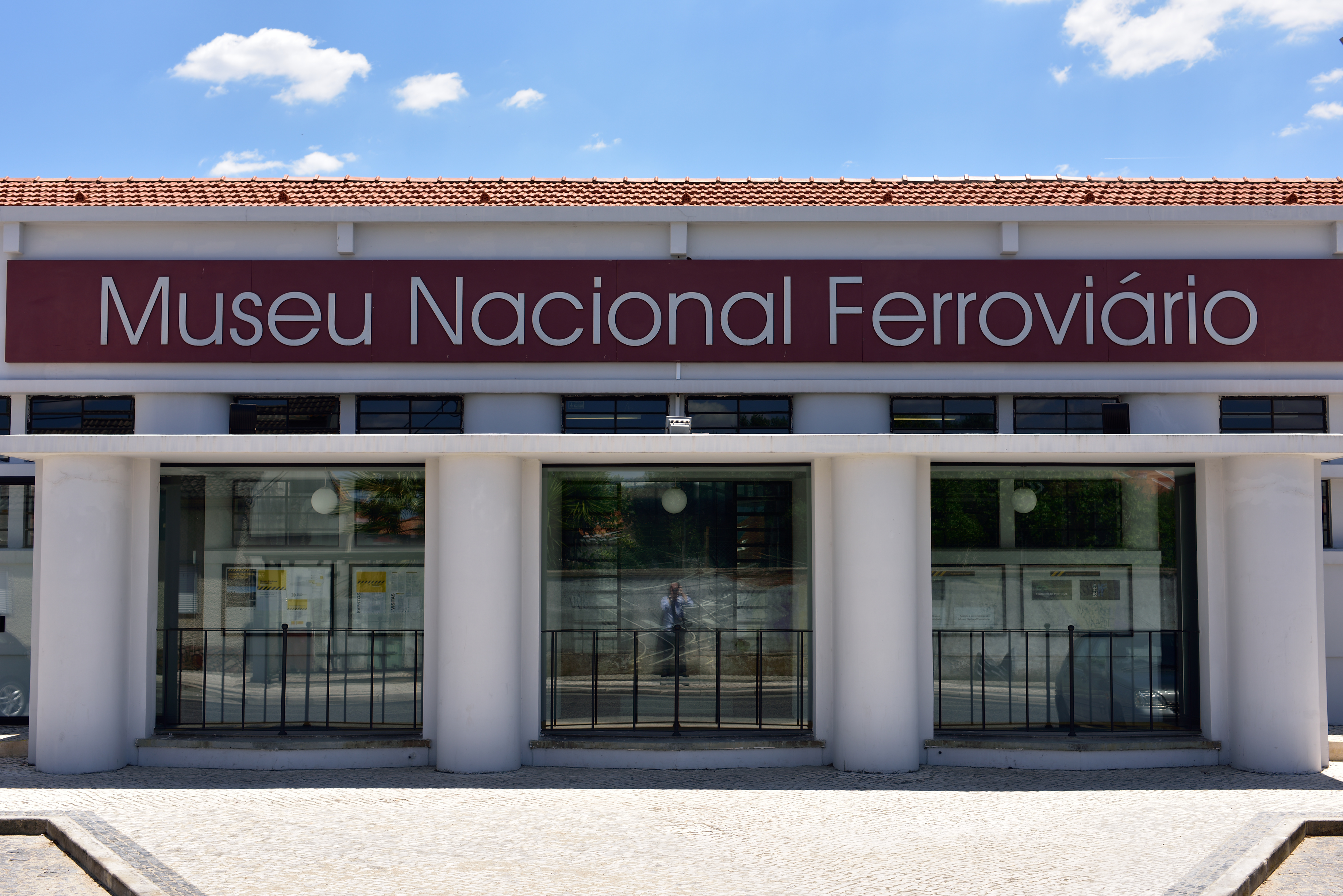 Museu Nacional Ferroviário National Railway Museum Entroncamento Portugal